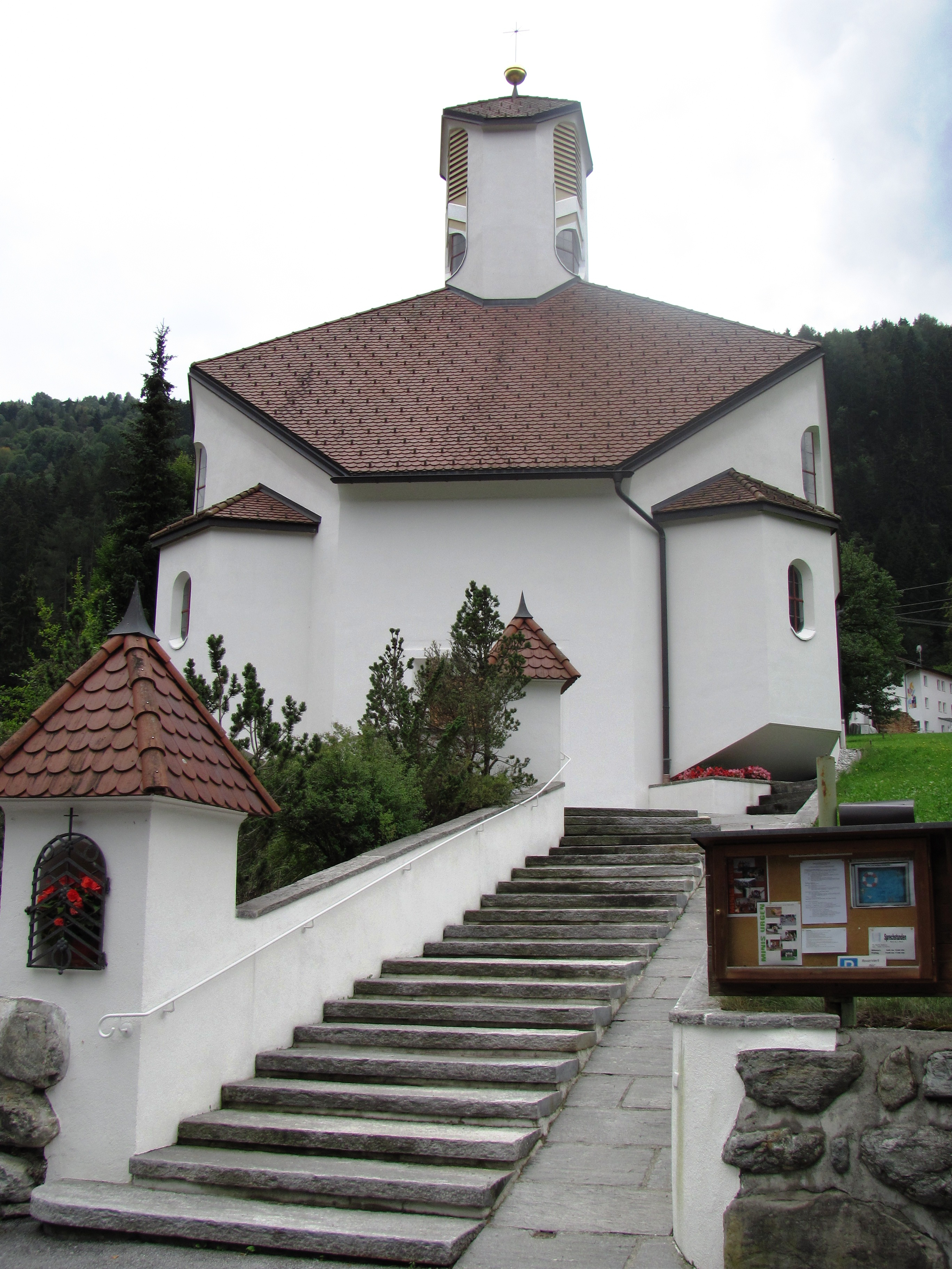 Filialkirche hl. Wolfgang, Fließ, Tirol